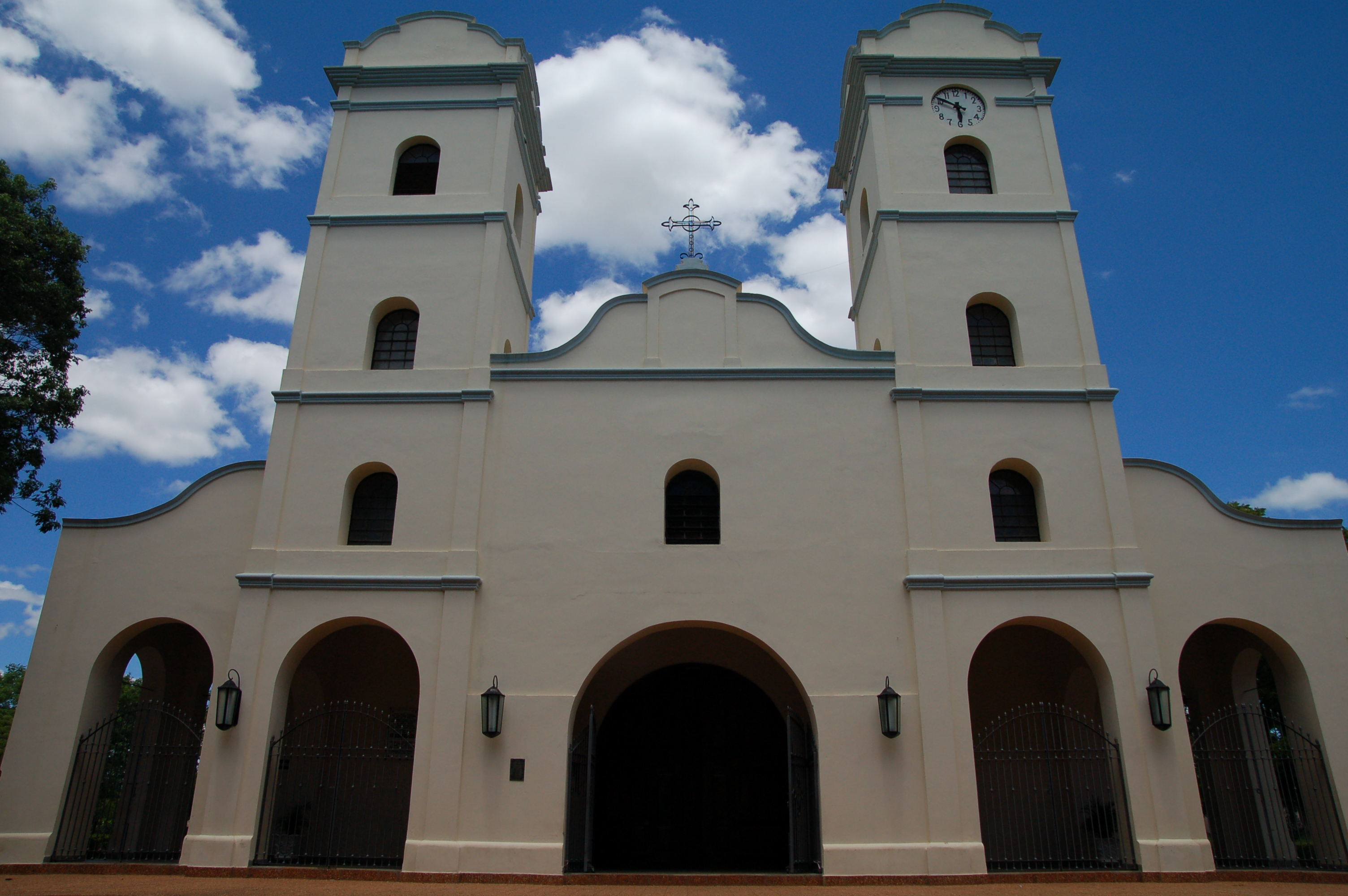 Catedral de Carapeguá (Paraguay)